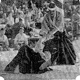 眞蔭流柔術の形